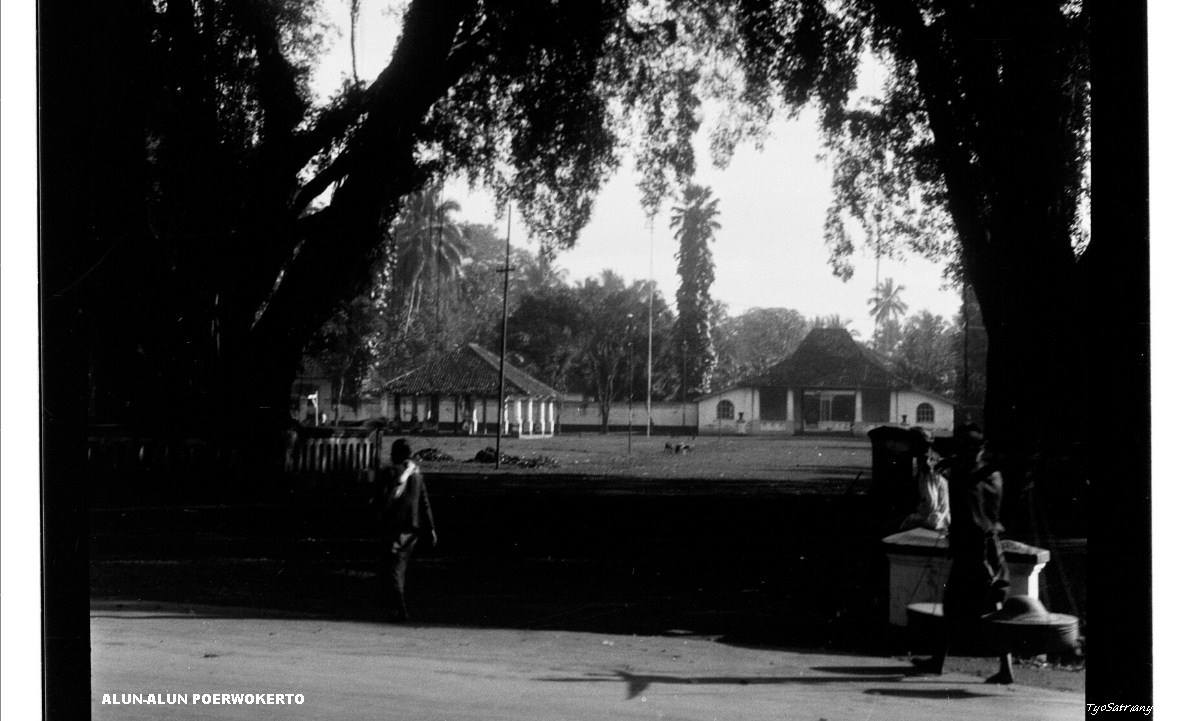 Alun Alun Di Purwokerto.